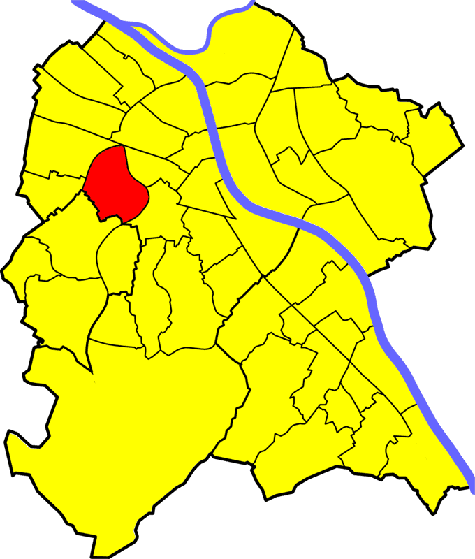 Endenich in Bonn